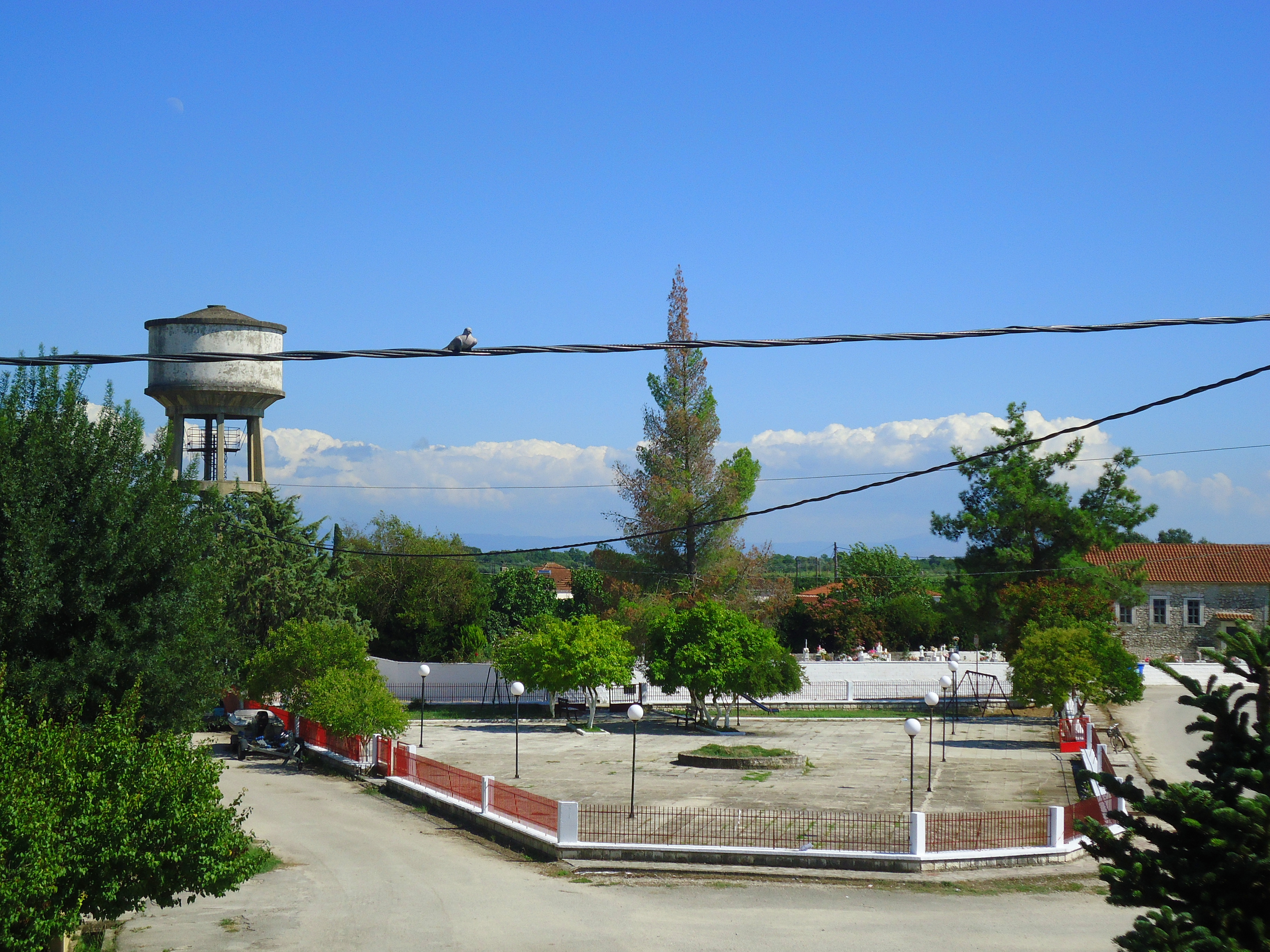 Η μεγάλη πλατεία της Γαβριάς.